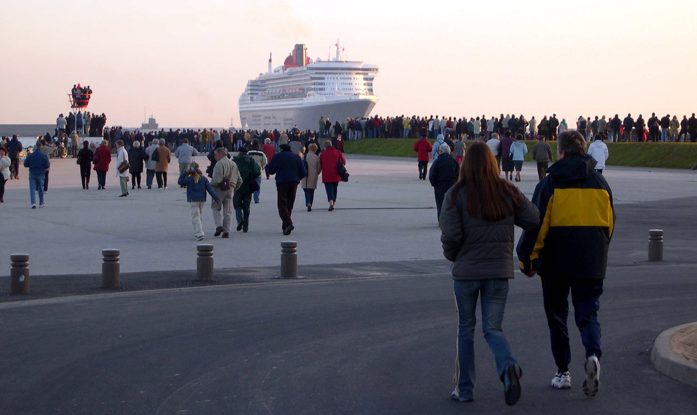 Arrivée du paquebot de croisière Queen Mery II en rade de Cherbourg. La population de la ville vient accueillir le bâteau qui renoue avec une longue tradition de croisière transatlantique depuis la gare maritime.